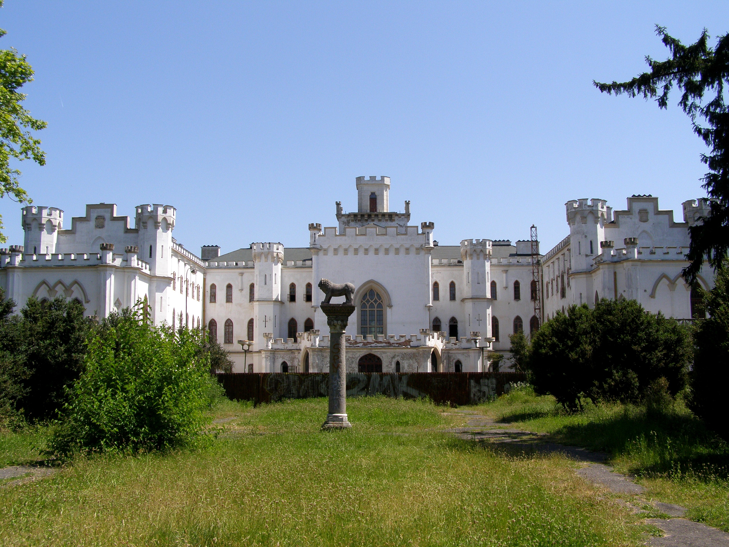 Celkový pohľad na hlavné priečelie kaštieľa